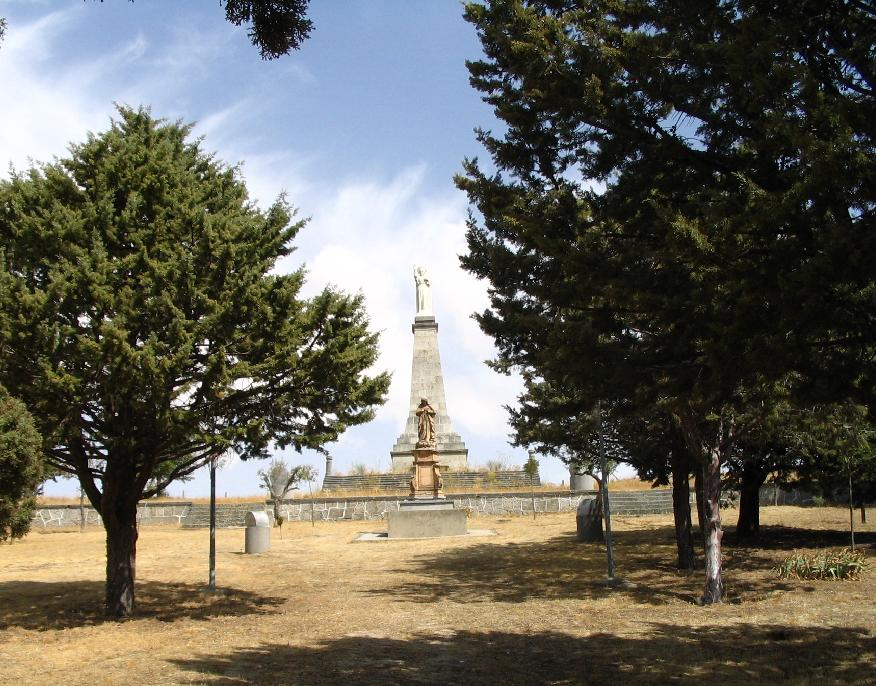 Cerro, imagenes de los Sagrados Corazones de Jesús y María, Macotera